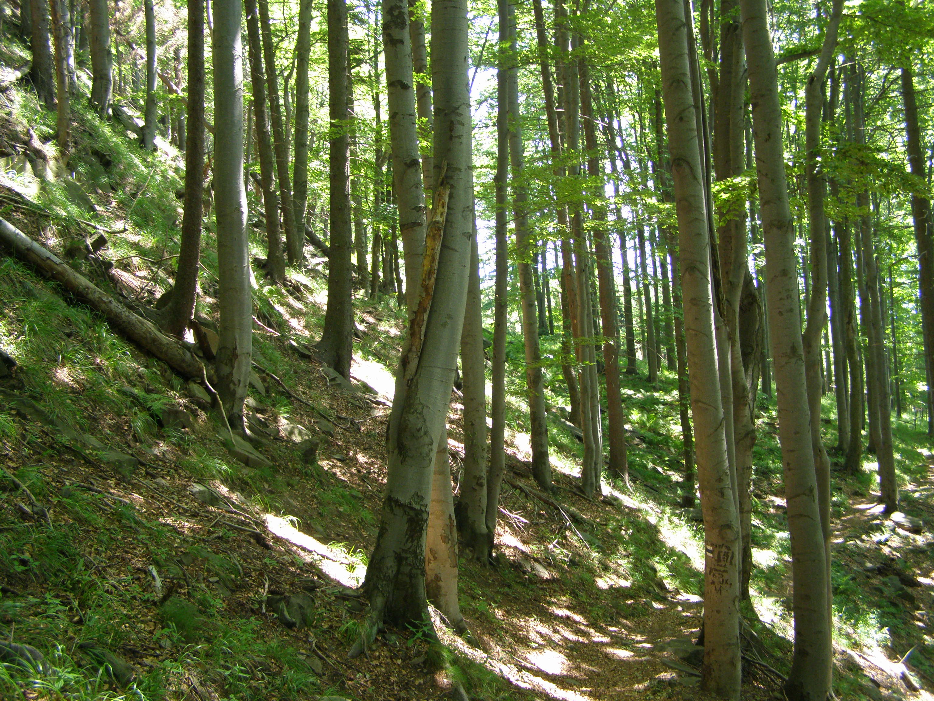 Kunčice pod Ondřejníkem, Přírodní rezervace Skalka